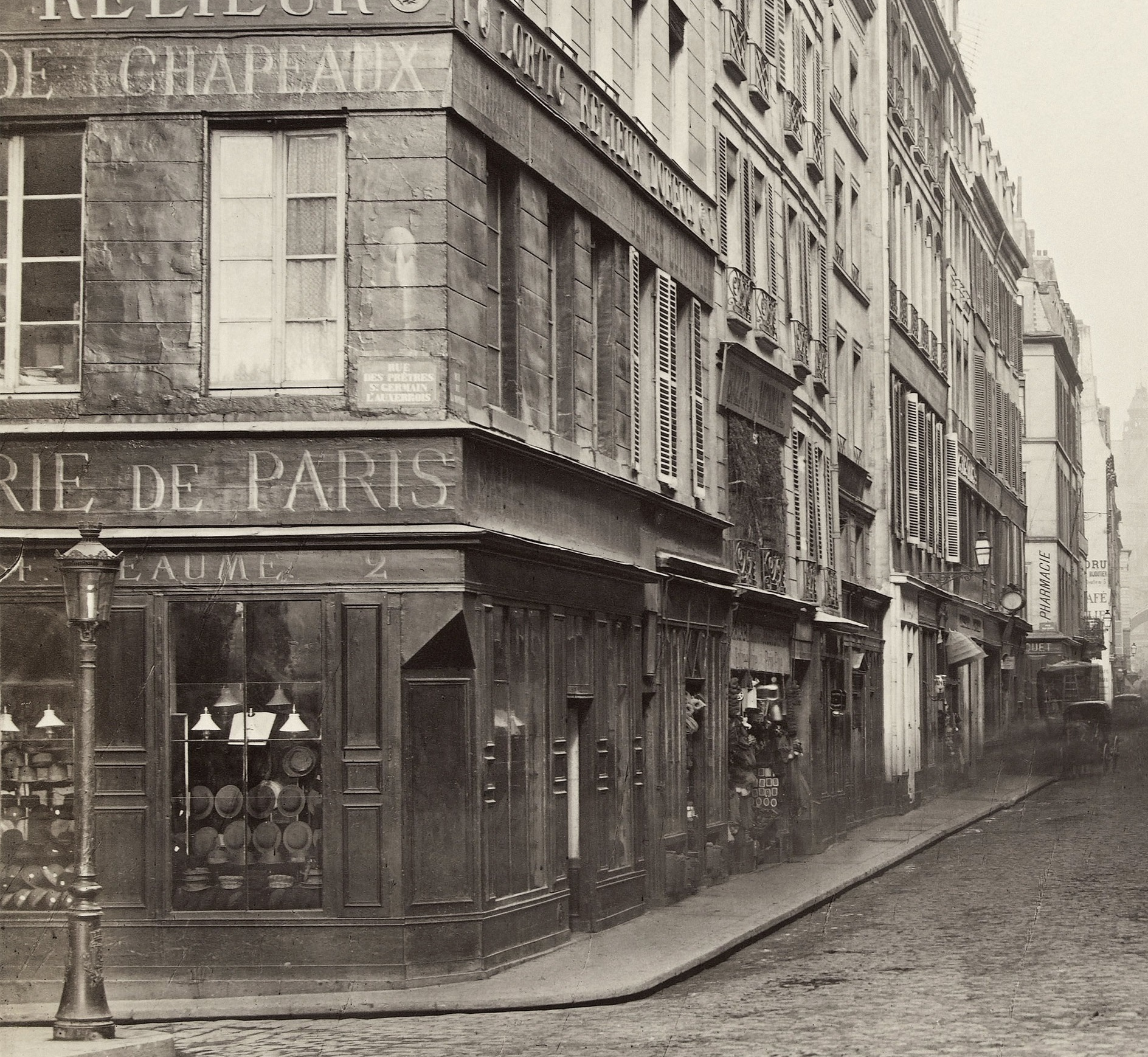 Chapellerie Desfoux à l’angle de la rue de la Monnaie (à droite) et de la rue Saint Germain l’Auxerrois, détail d’une photographie de Charles Marville